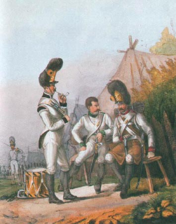 Deutsche Grenadiere der k.k. ö.-u. Armee Mitte des 19.Jahrhunderts